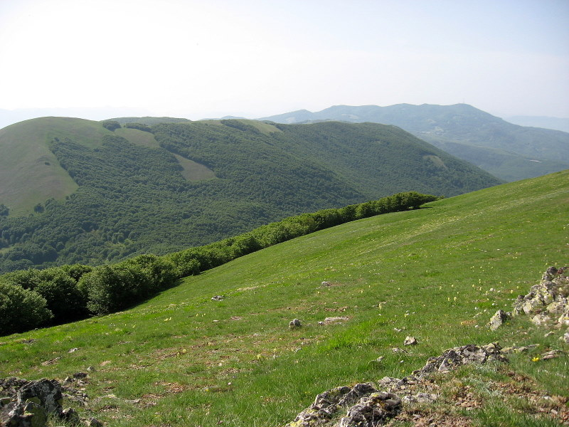 La serra di Calvello e il monte Pierfaone dalle praterie di vetta del monte Volturino